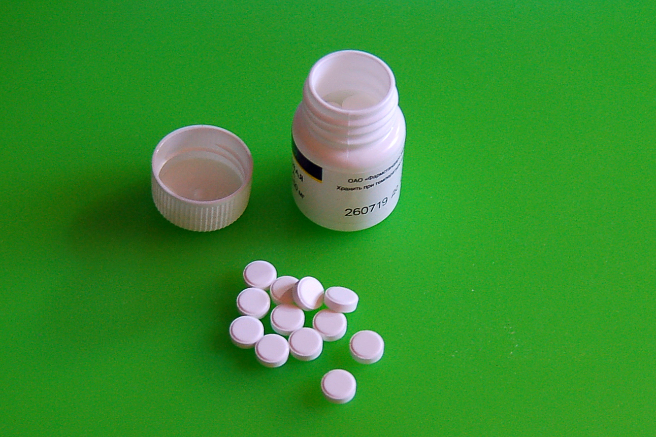 Таблетки